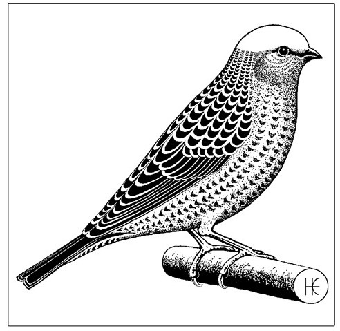 de ideale lizard volgens de LCA en FSS